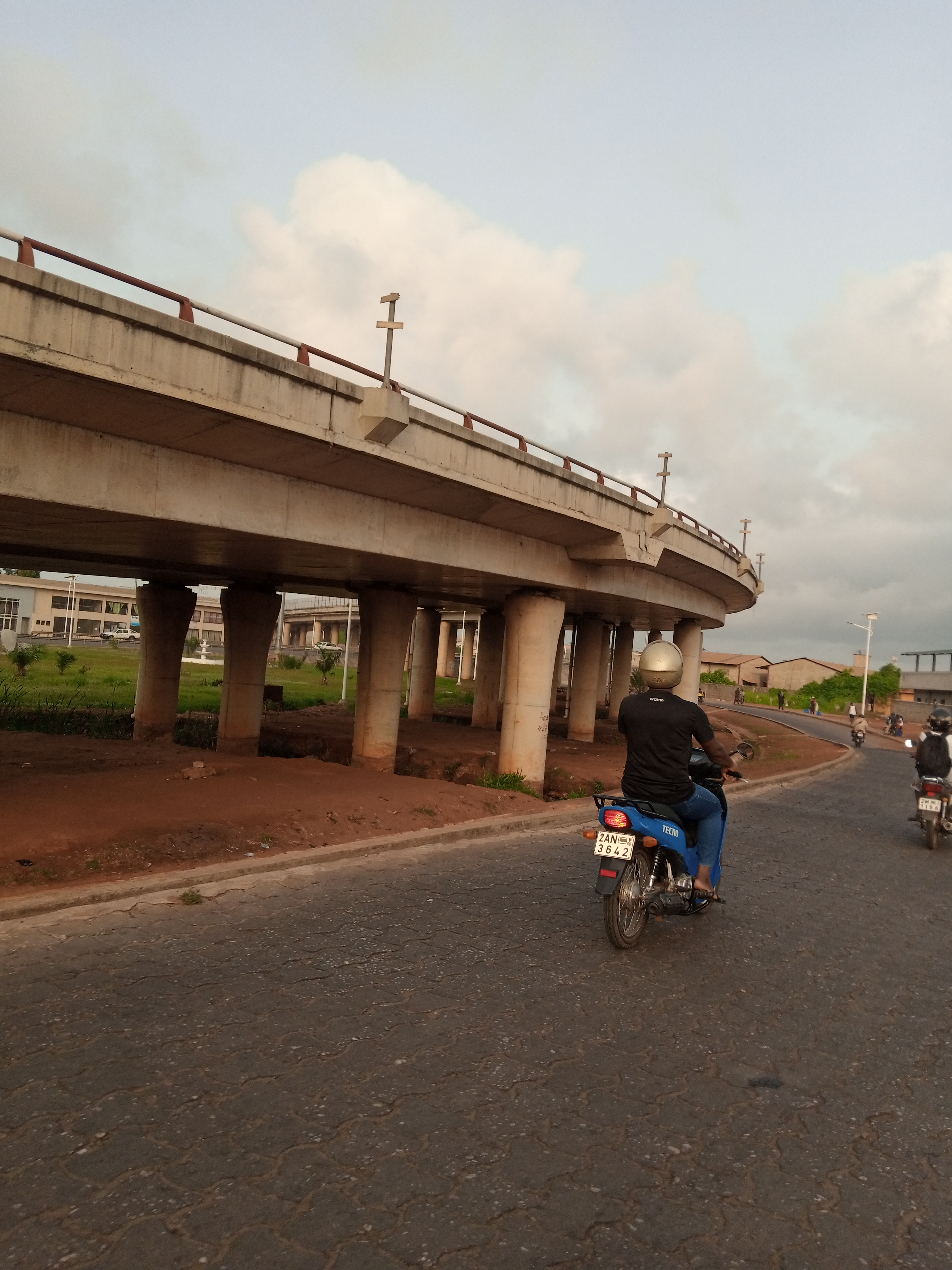 échangeur de Godomey au Bénin This is an image with the theme "Africa on the Move or Transport" from: Benin